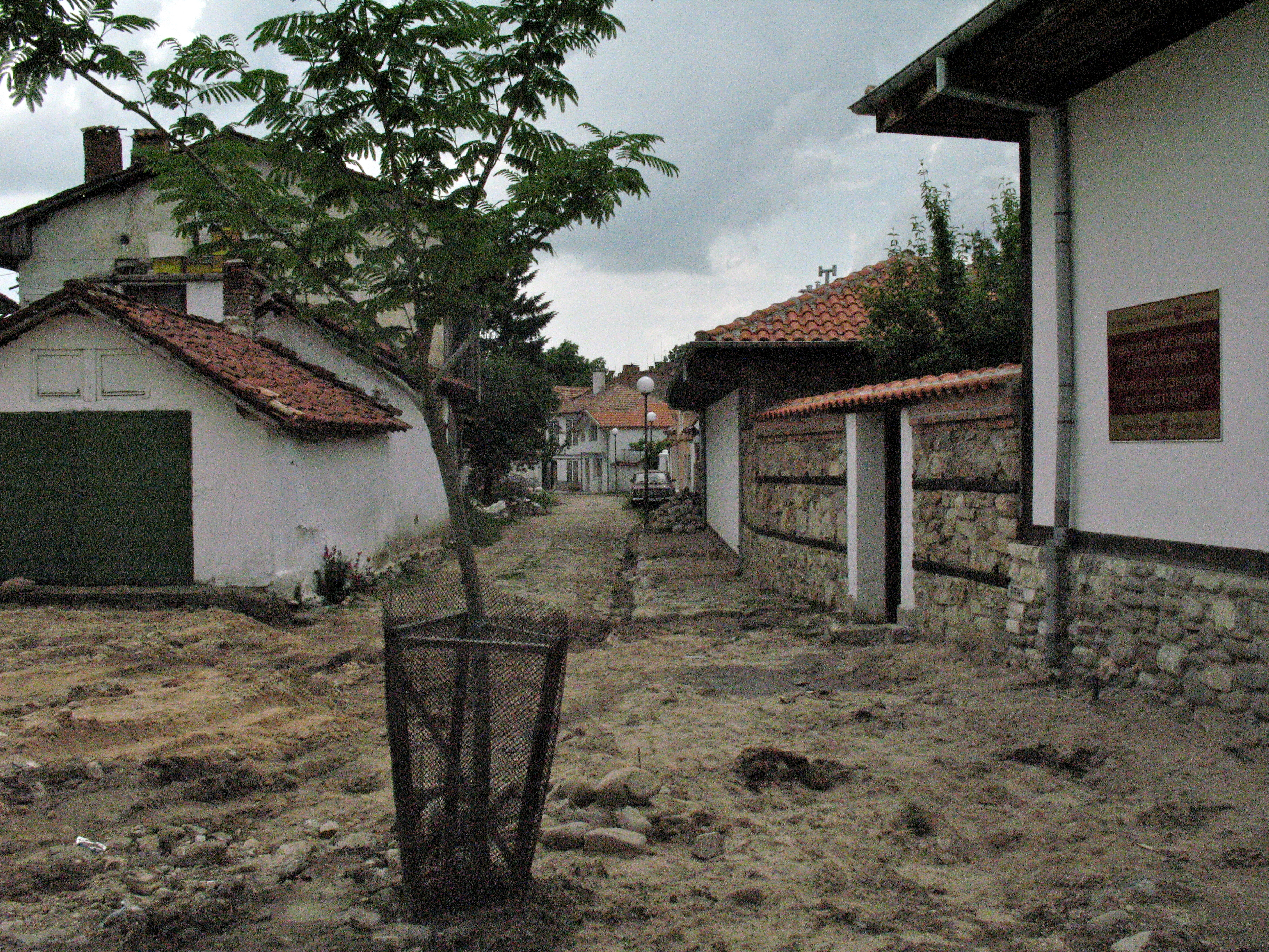 Къща музей „Акад. Дечко Узунов“